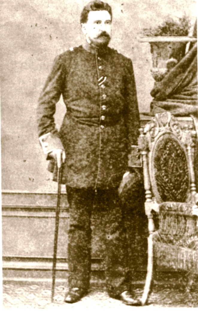 Hermann Christian Arndts (Photo von 1866)